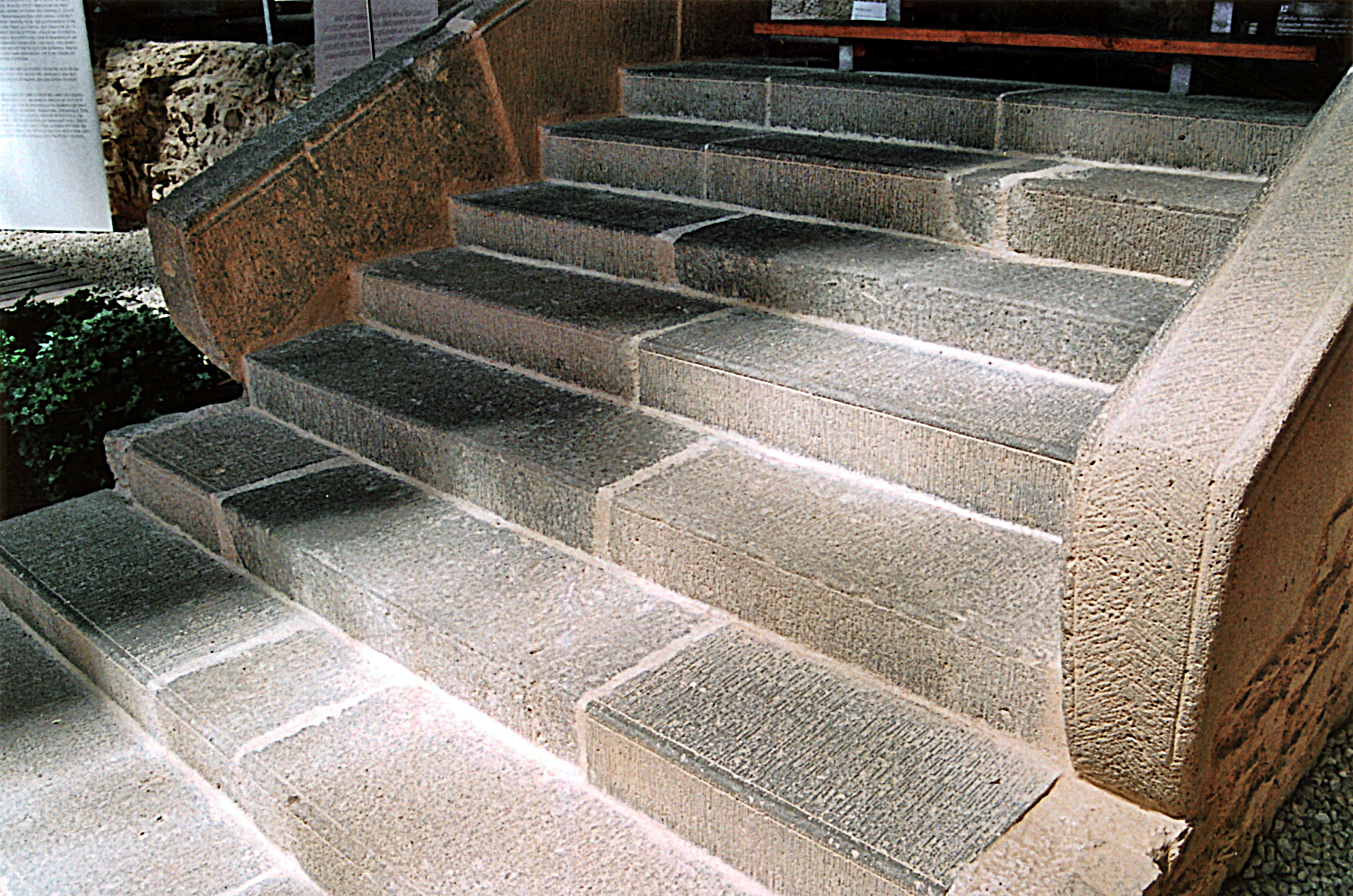 Villa Rustica Ahrweiler: Freitreppe am Portikus in ihrem 2. Bauzustand. Mit dem Umbau zur Mansio wurde die Treppe teils abgebrochen und ihr Material an anderer Stelle erneut verwendet. Für die heute in situ gezeigte Rekonstruktion wurde das teils sehr gut erhaltene Originalmaterial wieder zusammengestellt und wieder verbaut.